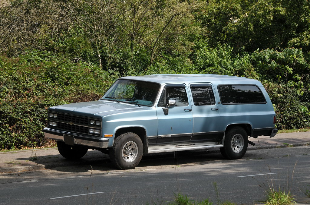 Chevrolet Suburban (1976)